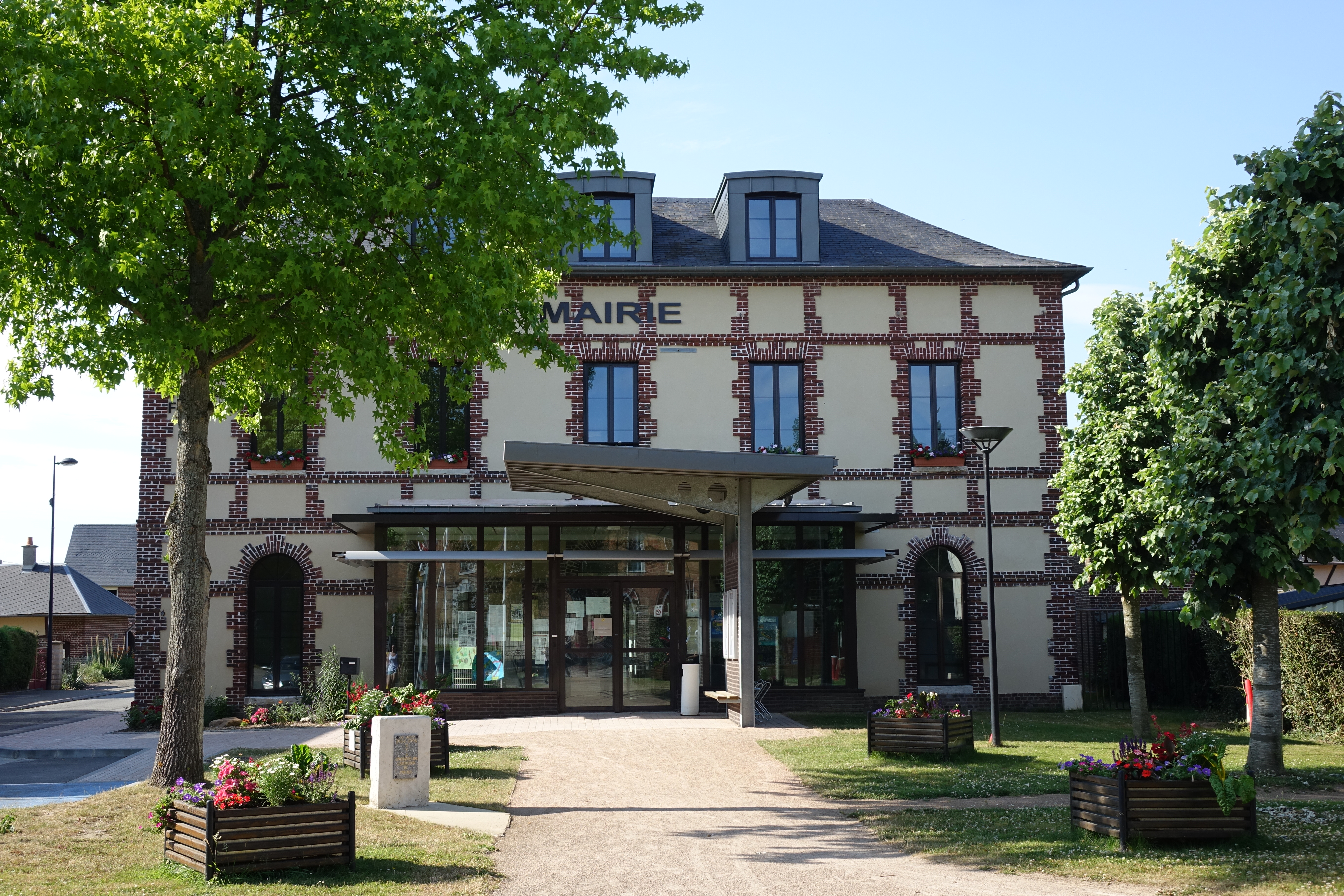 Mairie de Préaux, Seine-Maritime, France